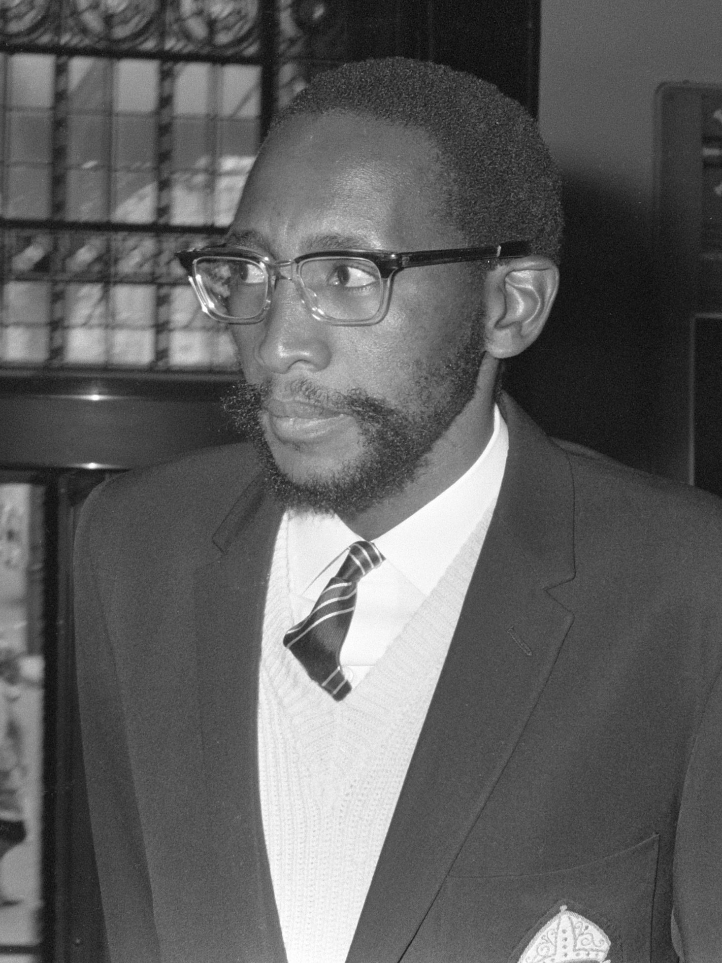 Koning Moshoeshoe II van Lesotho op bezoek in het Rijksmuseum, Amsterdam, tijdens zijn korte ballingschap in Nederland 14 april 1970